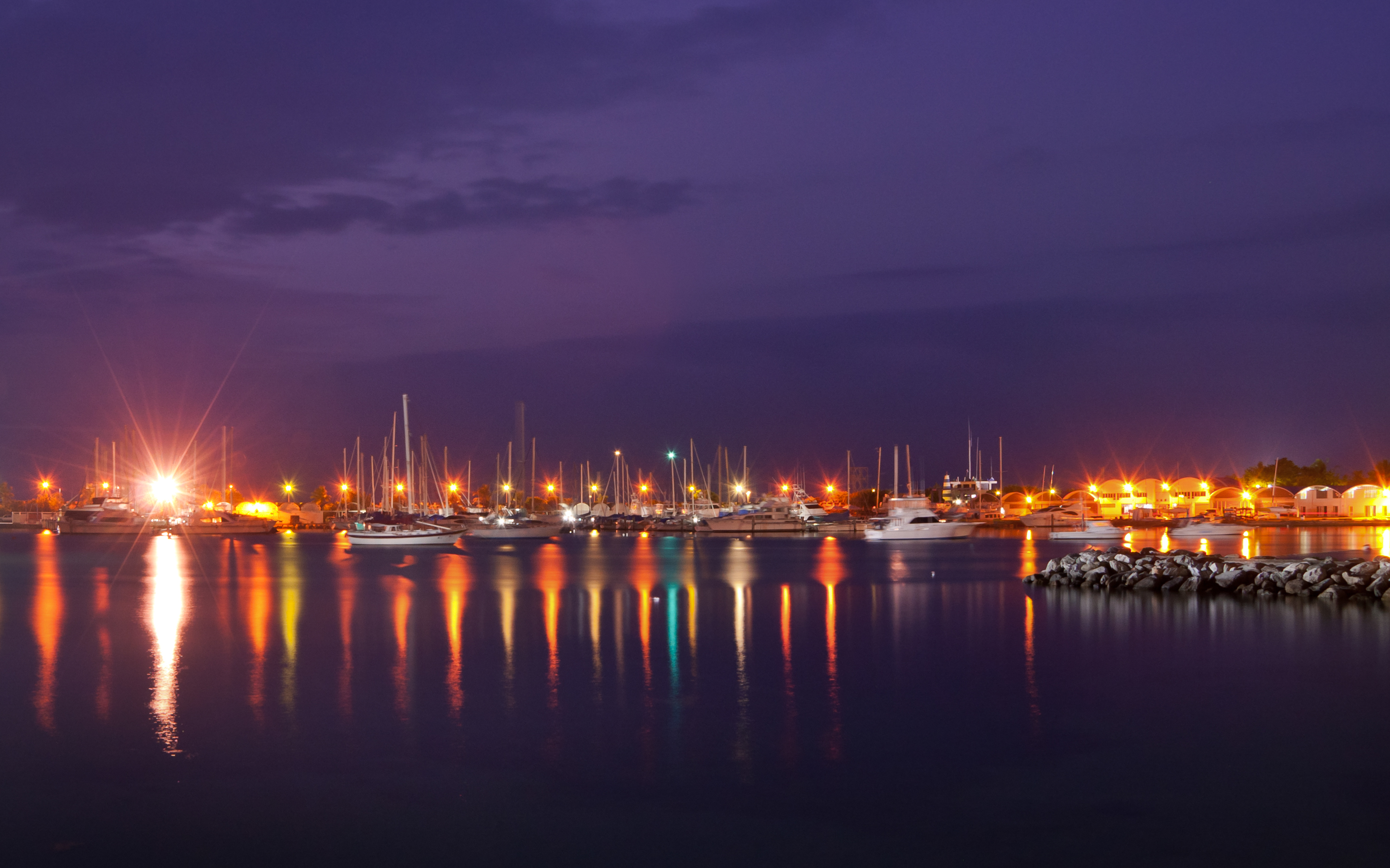 Vista de muelle en Naiguatá tras el atardecer, en el Mar Caribe, Venezuela.